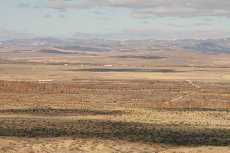 Долина Тес-Хема в Туве